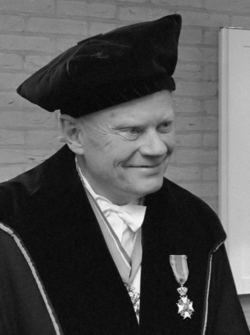 Lustrumviering Erasmus Universiteit ; Hare Majesteit spreekt met eredoctor prof. dr. drs. A. C. R. Dreesmann 8 november 1988